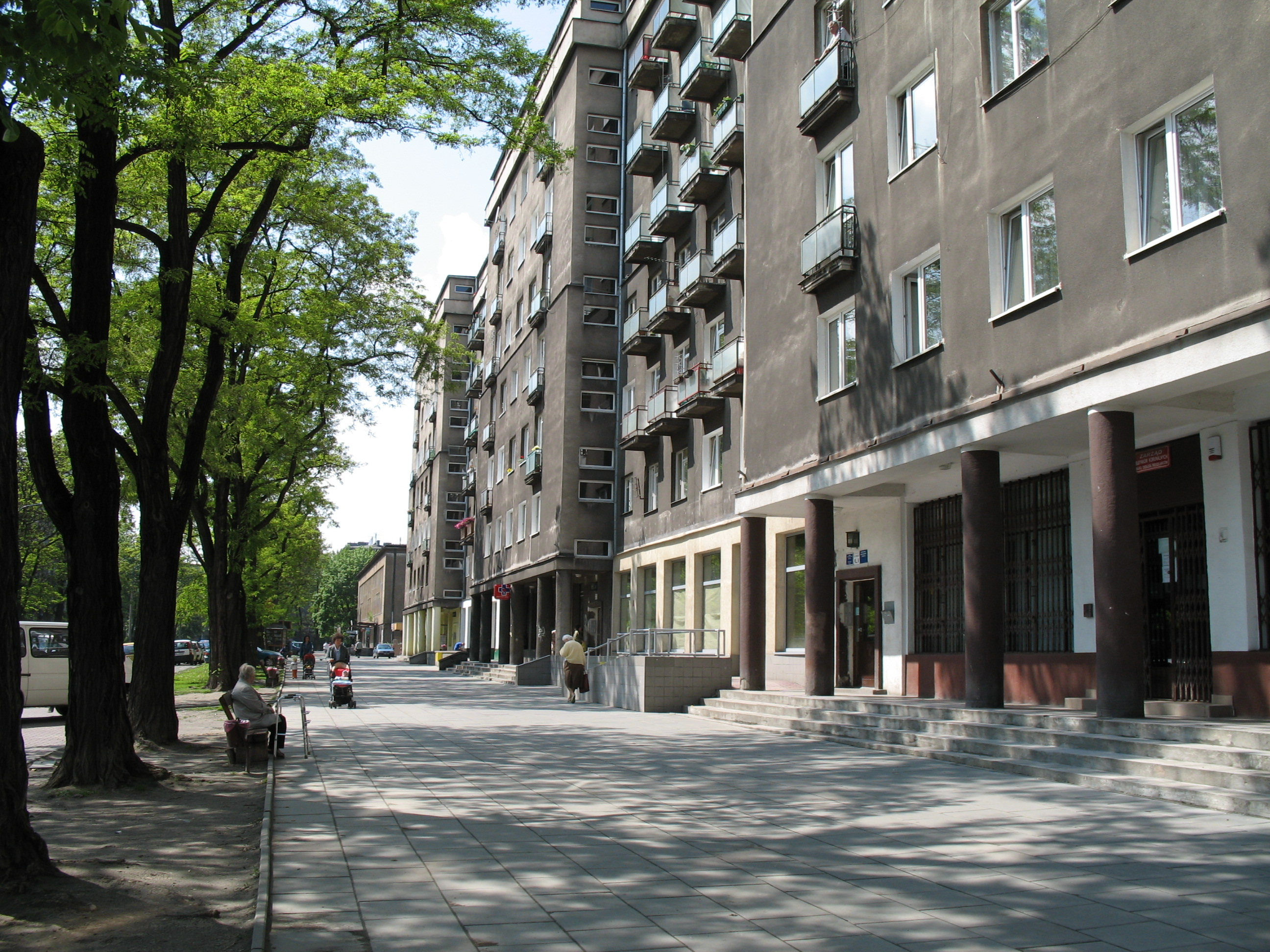 Ciąg sklepów na Osiedlu Uroczym w Krakowie